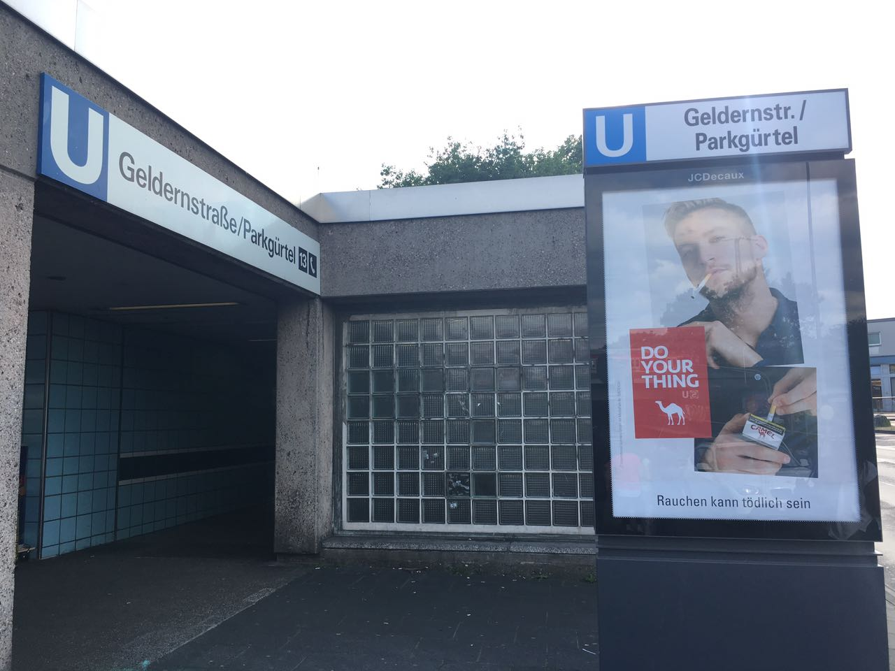 Haltepunkt Köln Geldernstr.-Parkgürtel(3)